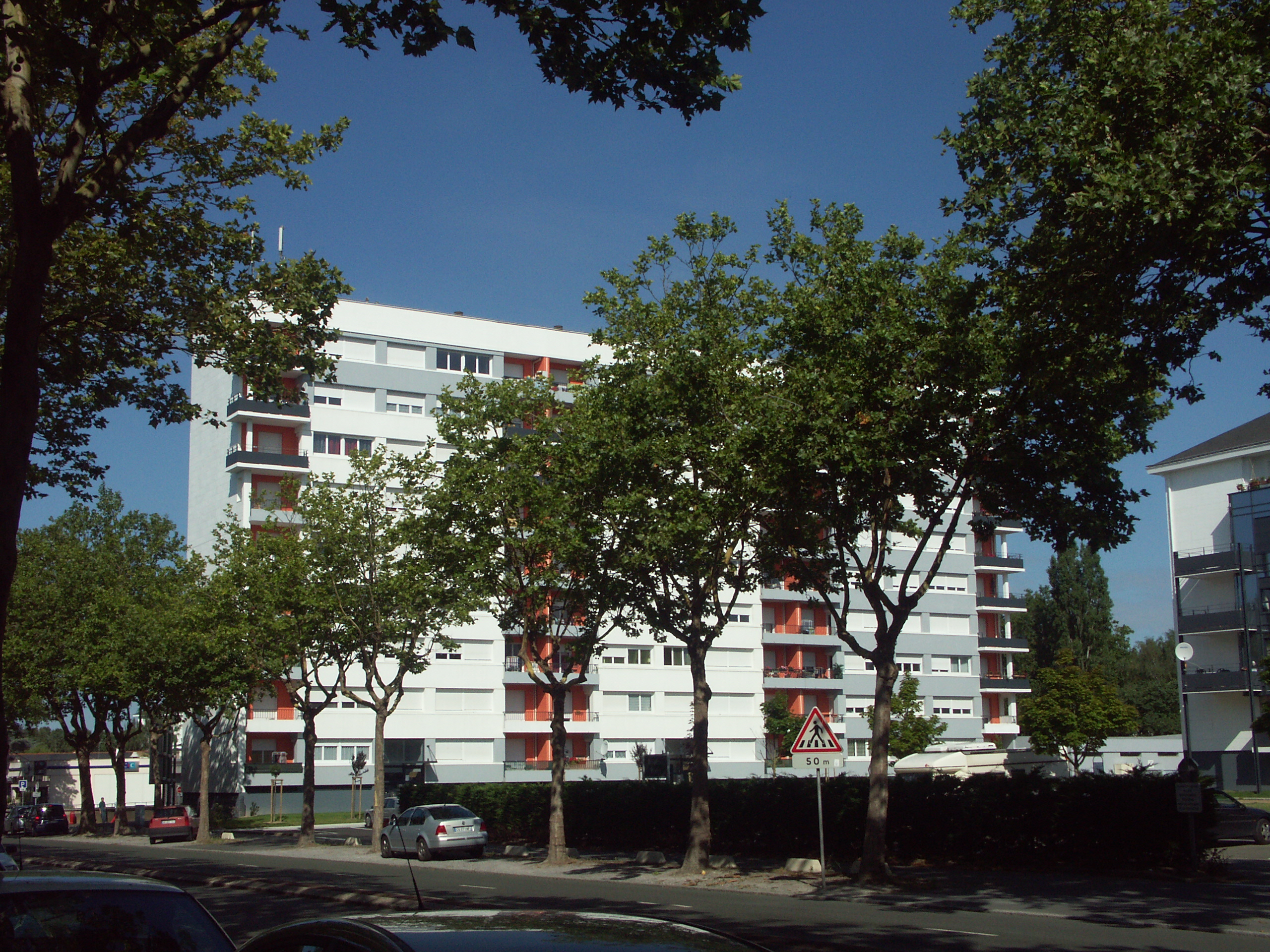 Immeuble HLM sur le boulevard Joseph Bédier